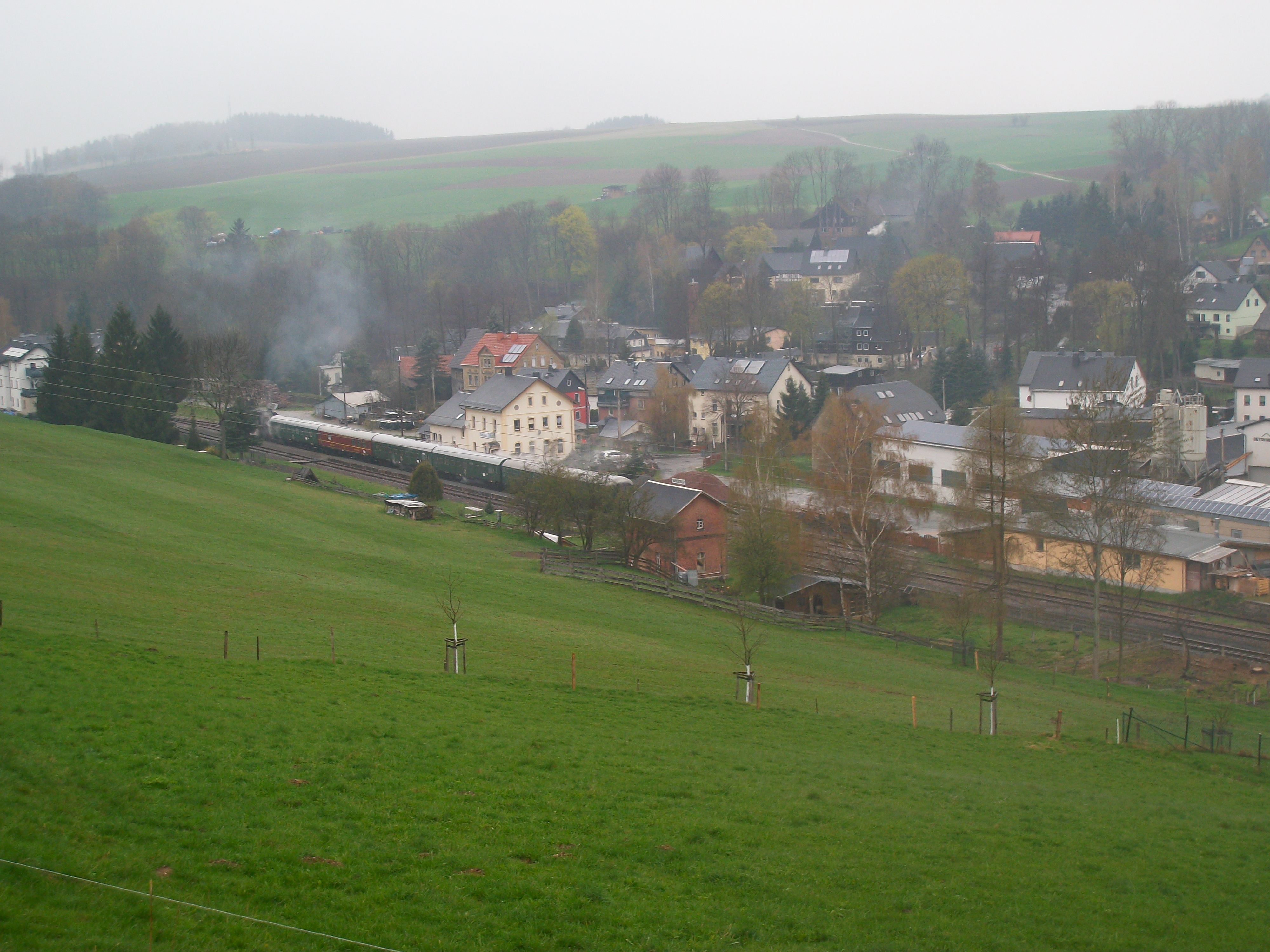 EAB im Bahnhof Markersbach (2016)